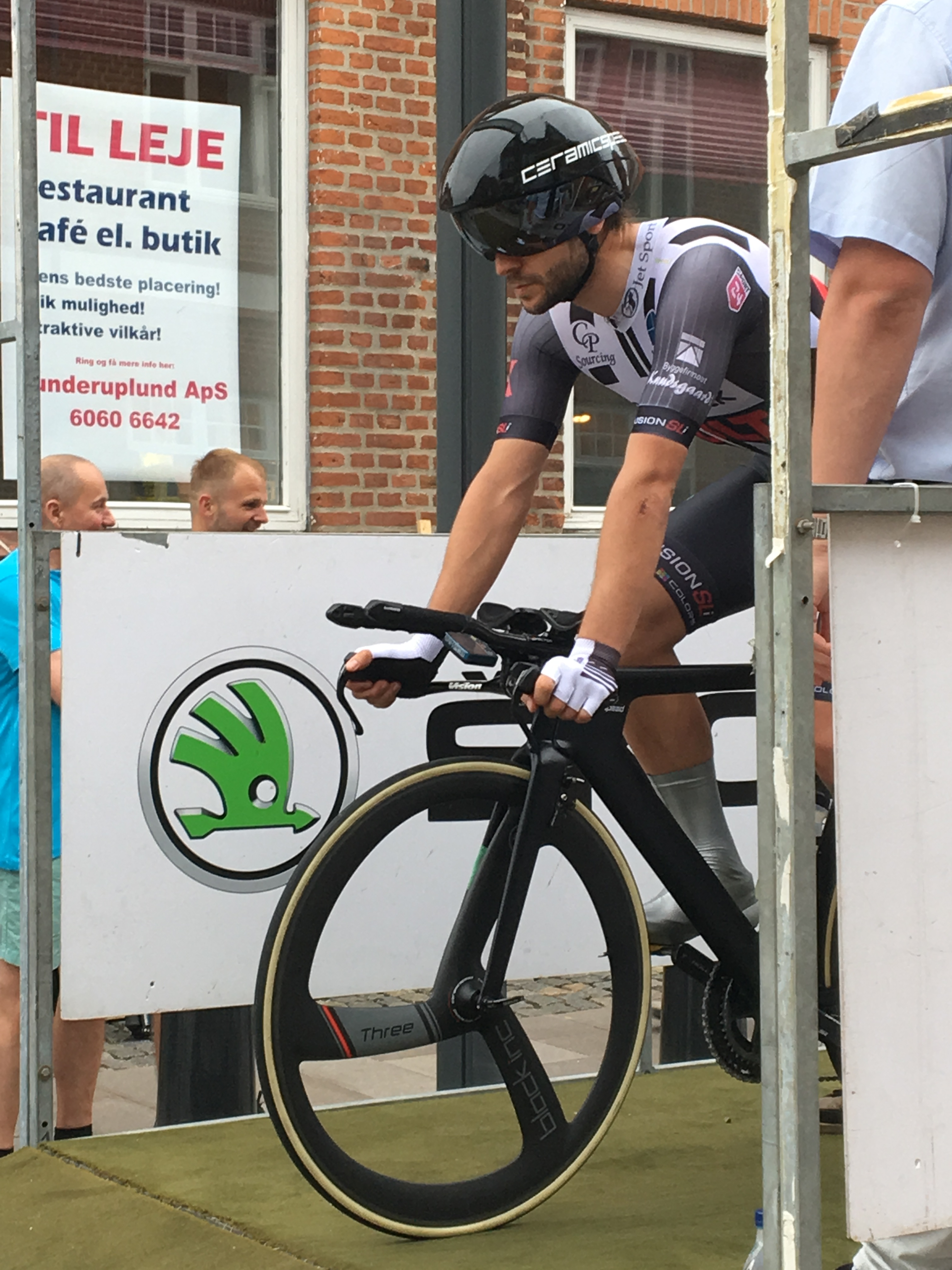 Martin Mortensen ved DM i enkeltstart 2017 i Grindsted